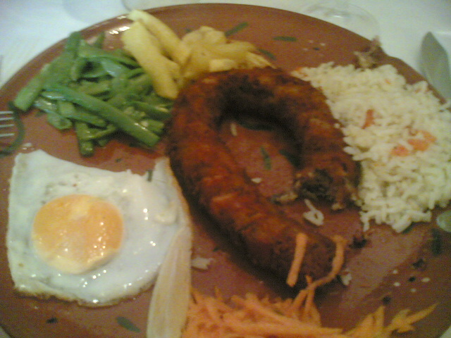 Alheira, a portuguese kind of sausage